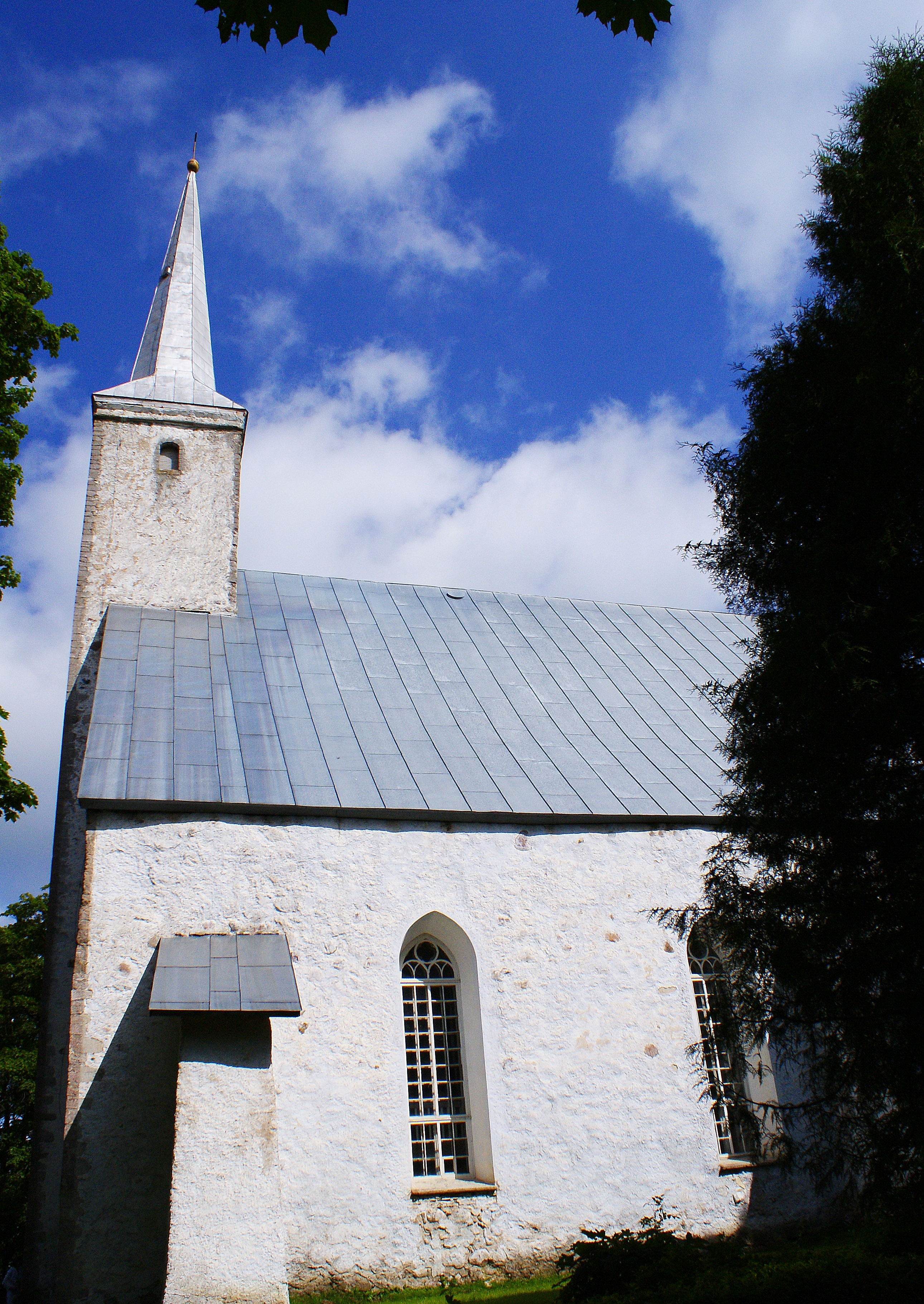 Kadrina kirik